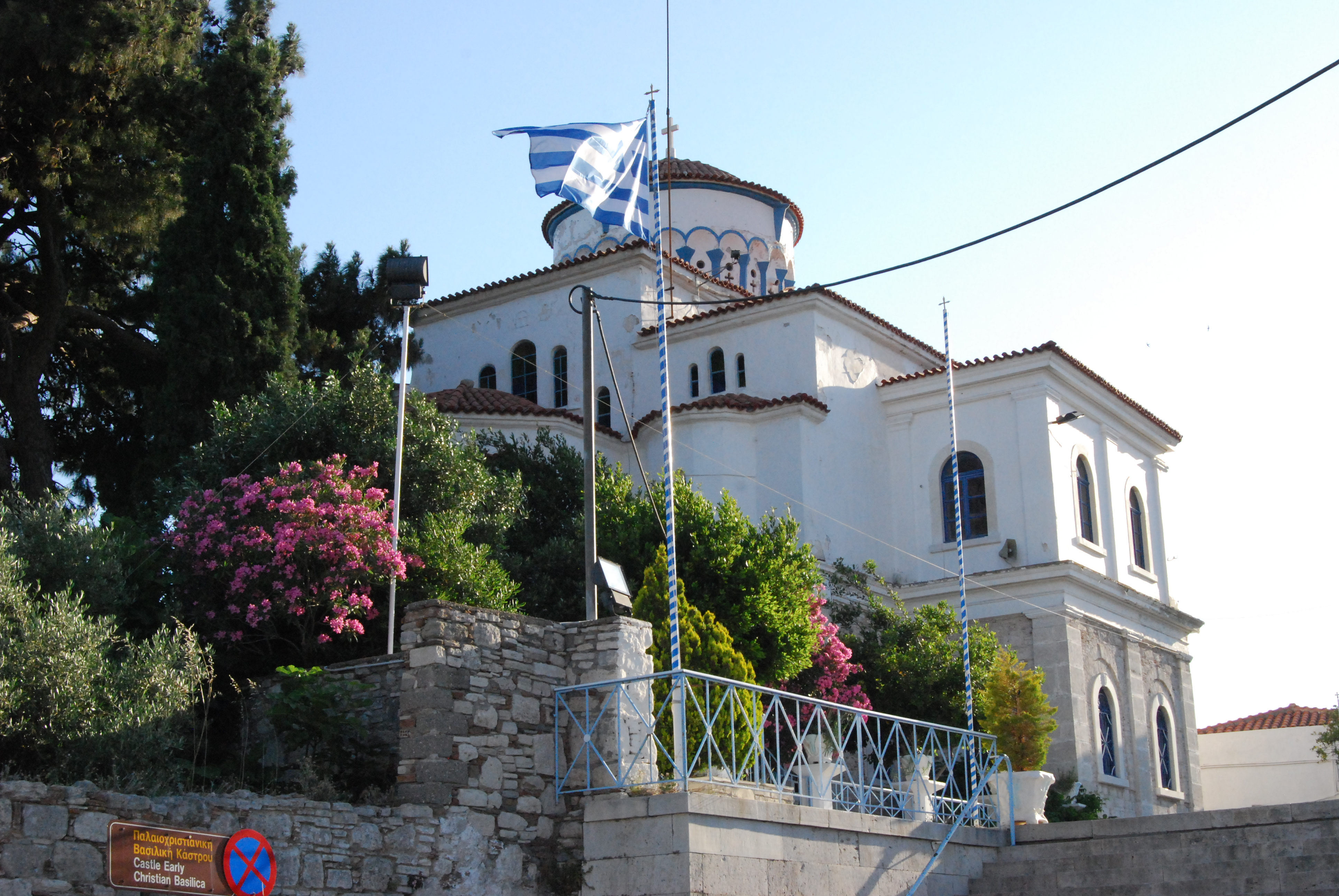 Kirche Pythagorion